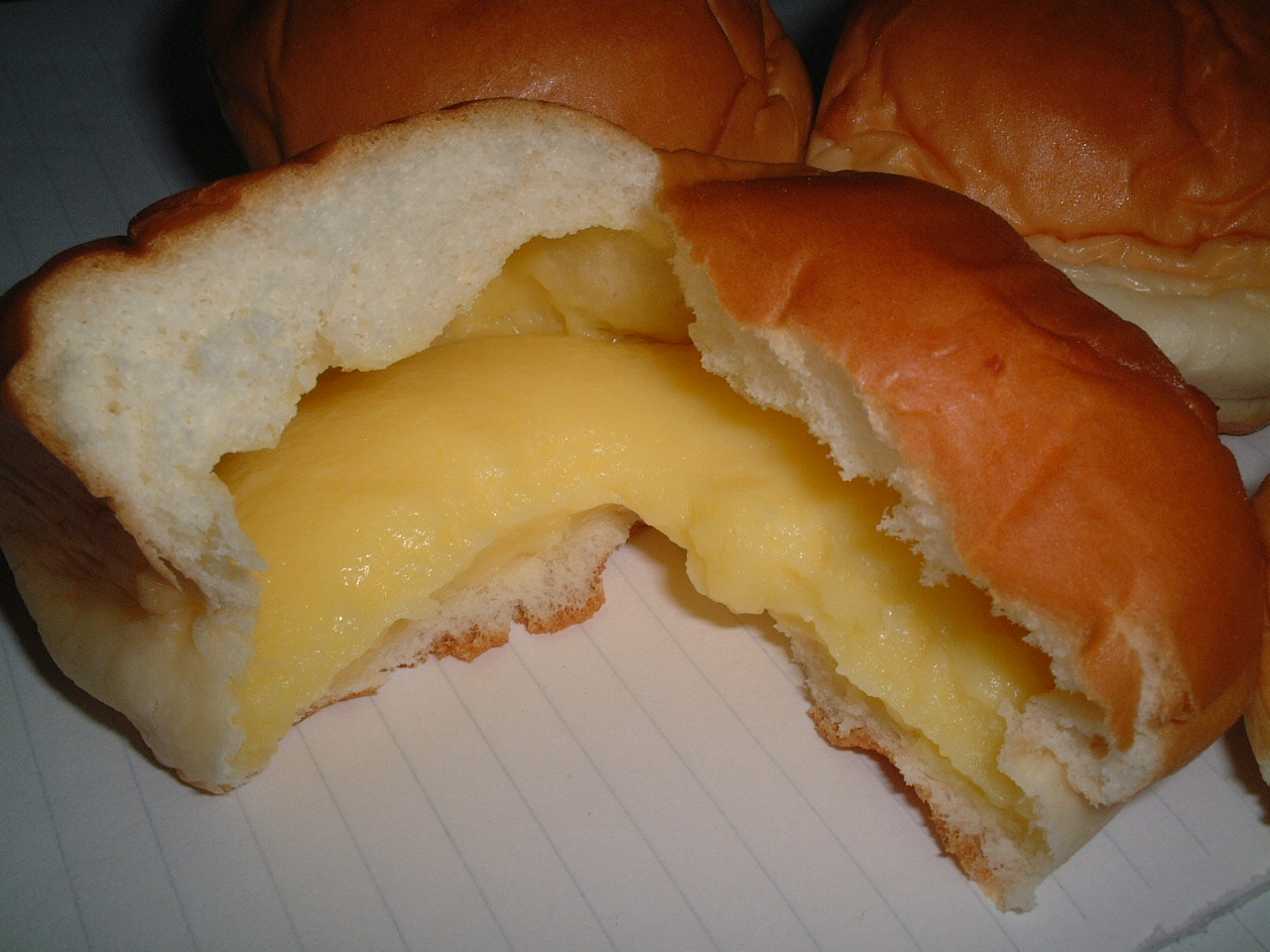 薄皮クリームパンの画像